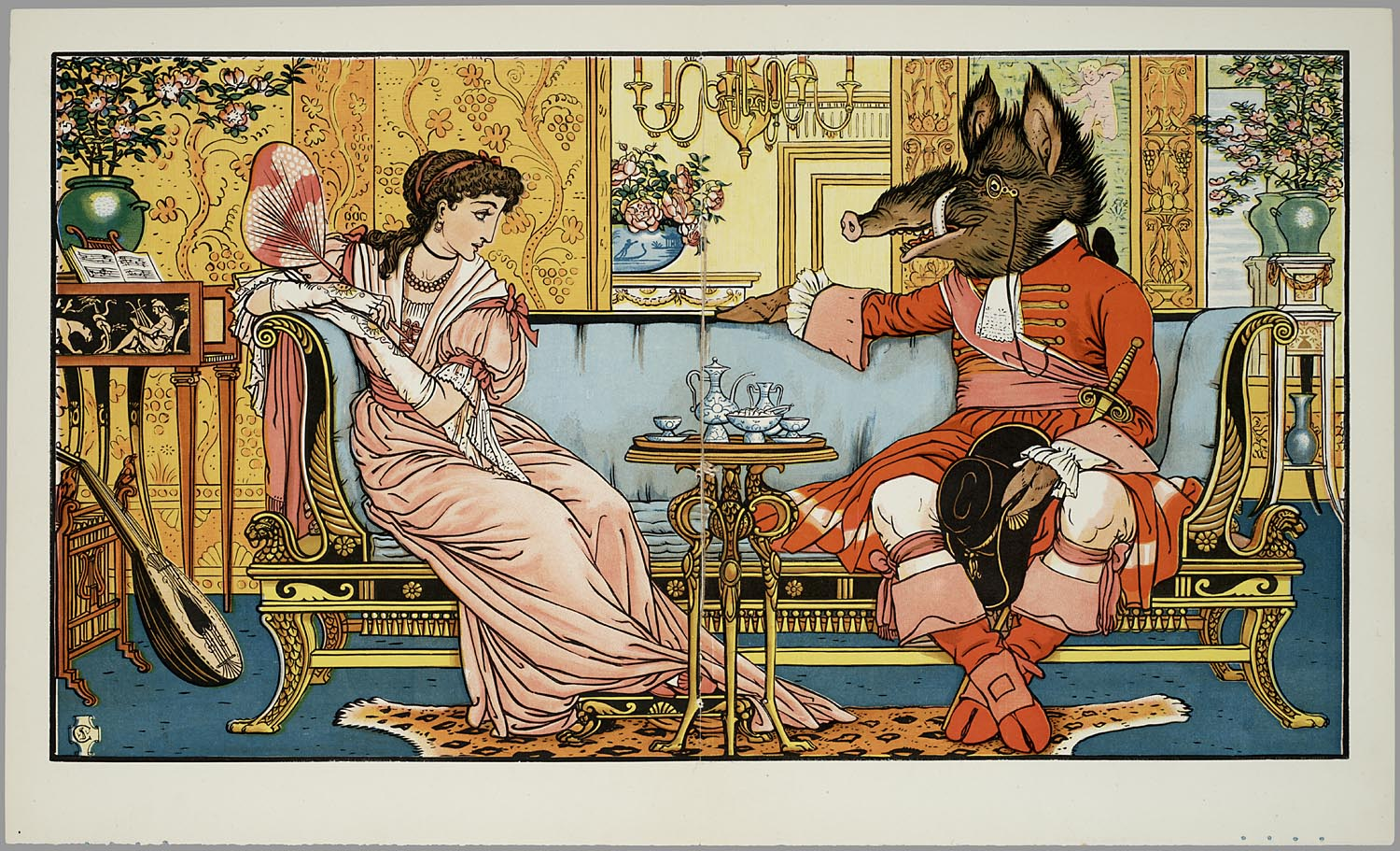 Nieuwe serie // Vertaling van het in hetzelfde jaar in Engeland verschenen boek met de schitterende houtgravures in kleurendruk van Walter Crane, echter zonder vermelding van zijn naam op het omslag en met een qua stijl geheel afwijkende illustratie op de voorkant. Bevat 6 kleurenplaten, waarvan een over twee pagina's, gesigneerd met een kraanvogel en vvc. Het sprookje over de koopmansdochter die gaat houden van een in een monster betoverde prins verscheen oorspronkelijk in 1756 in het 'Magasin des enfans'. Belle en het beest 6 bl., 6 bl. pl : gekl. houtgrav // De keerzijde der bladen is onbedrukt // De litho op de voorkant is een 'steendruk v.Harms & Co. Amst' // Vert. van Beauty and the beast / Walter Crane, Routledge, 1874 // Ingekleurd : f 0,90 Prentenboeken // Sprookjes